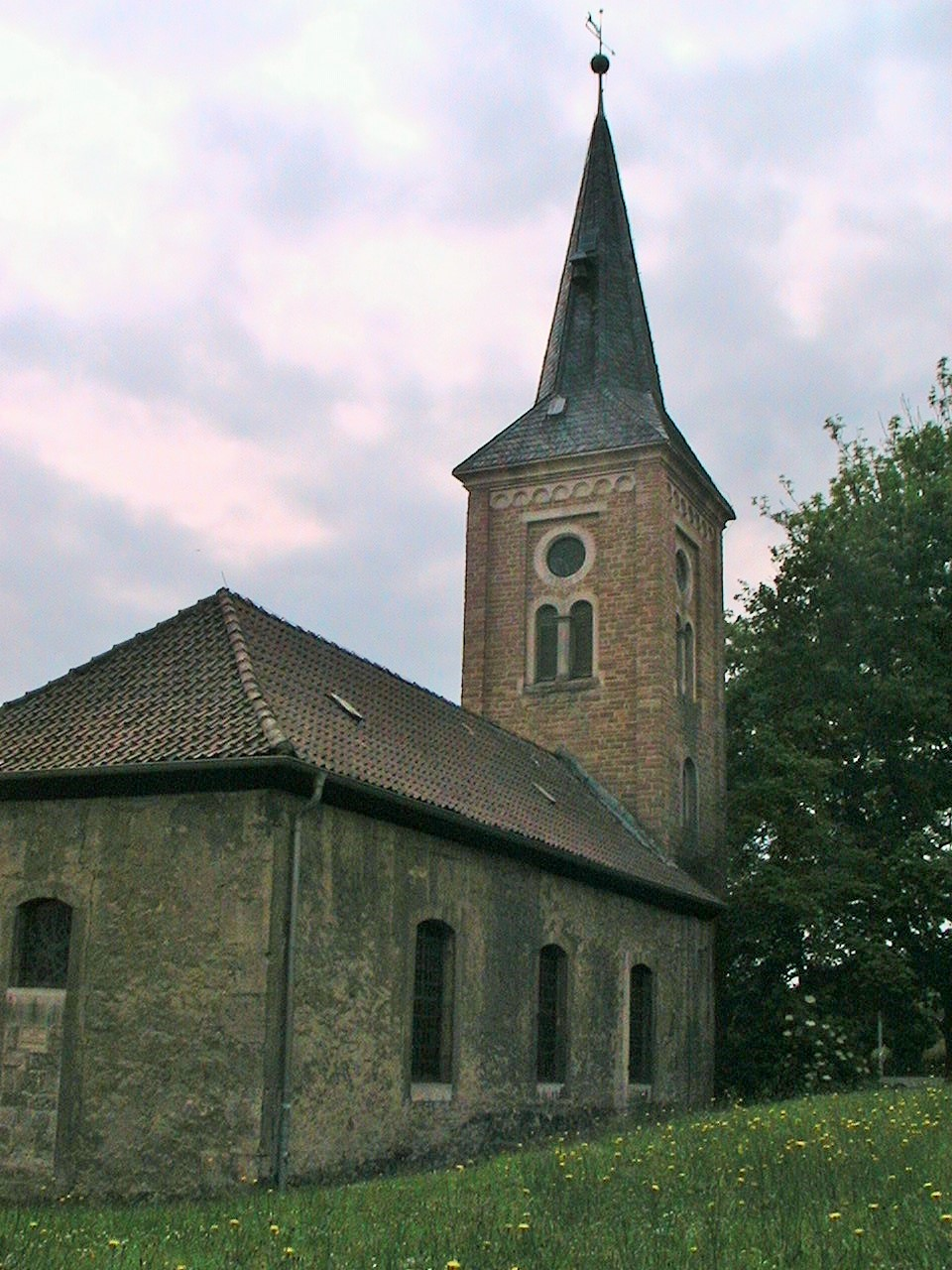 Dorfkirche von Barnstorf im Landkreis Wolfenbüttel